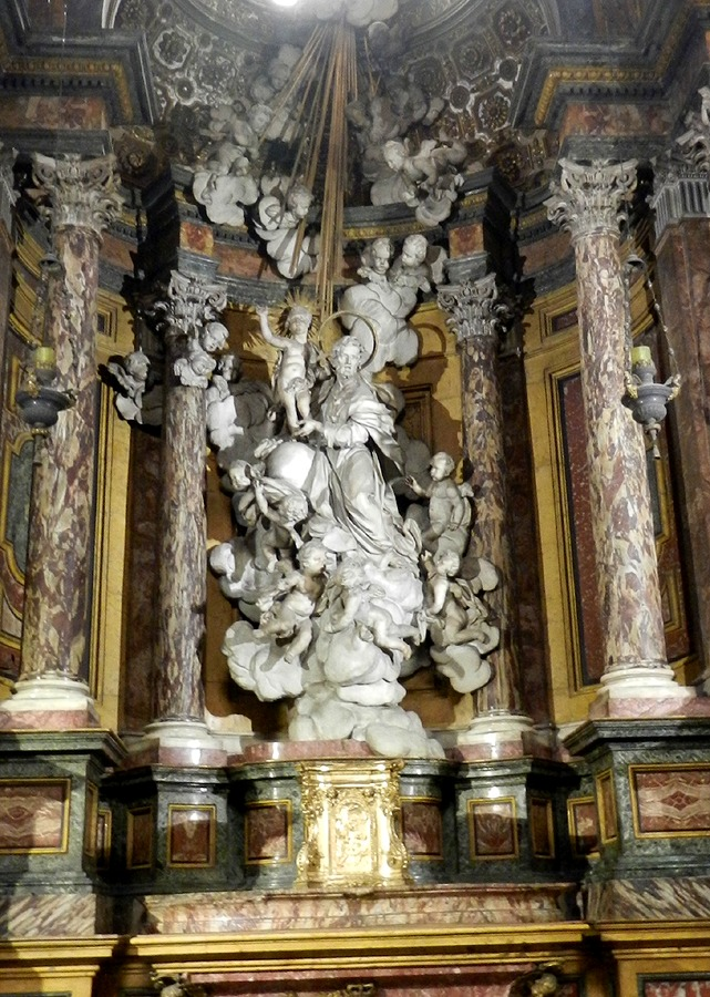 Torino - Altare di S. Giuseppe realizzato nel 1735 da Filippo Juvarra nella Chiesa di S. Teresa